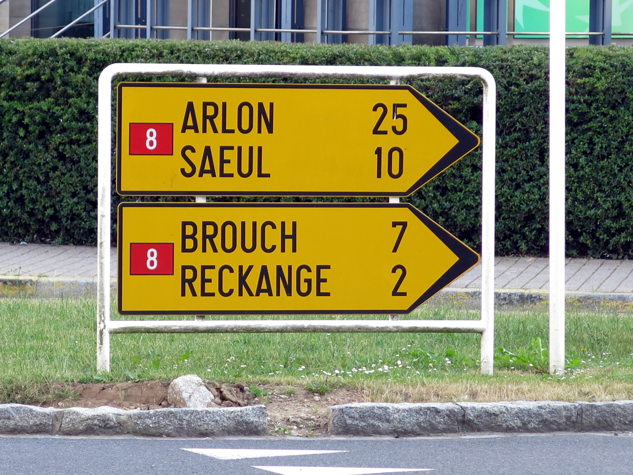 Schëlter an der Rue d'Arlon zu Miersch.